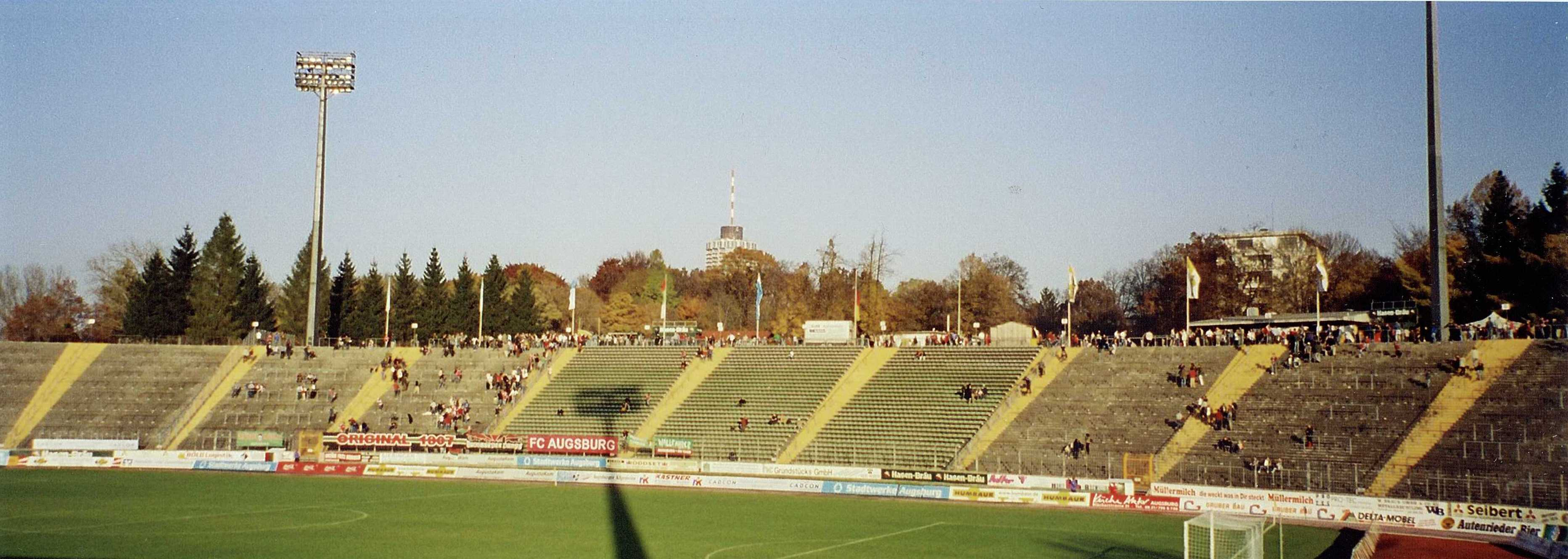 Augsburger Rosenaustadion, Gegengerade